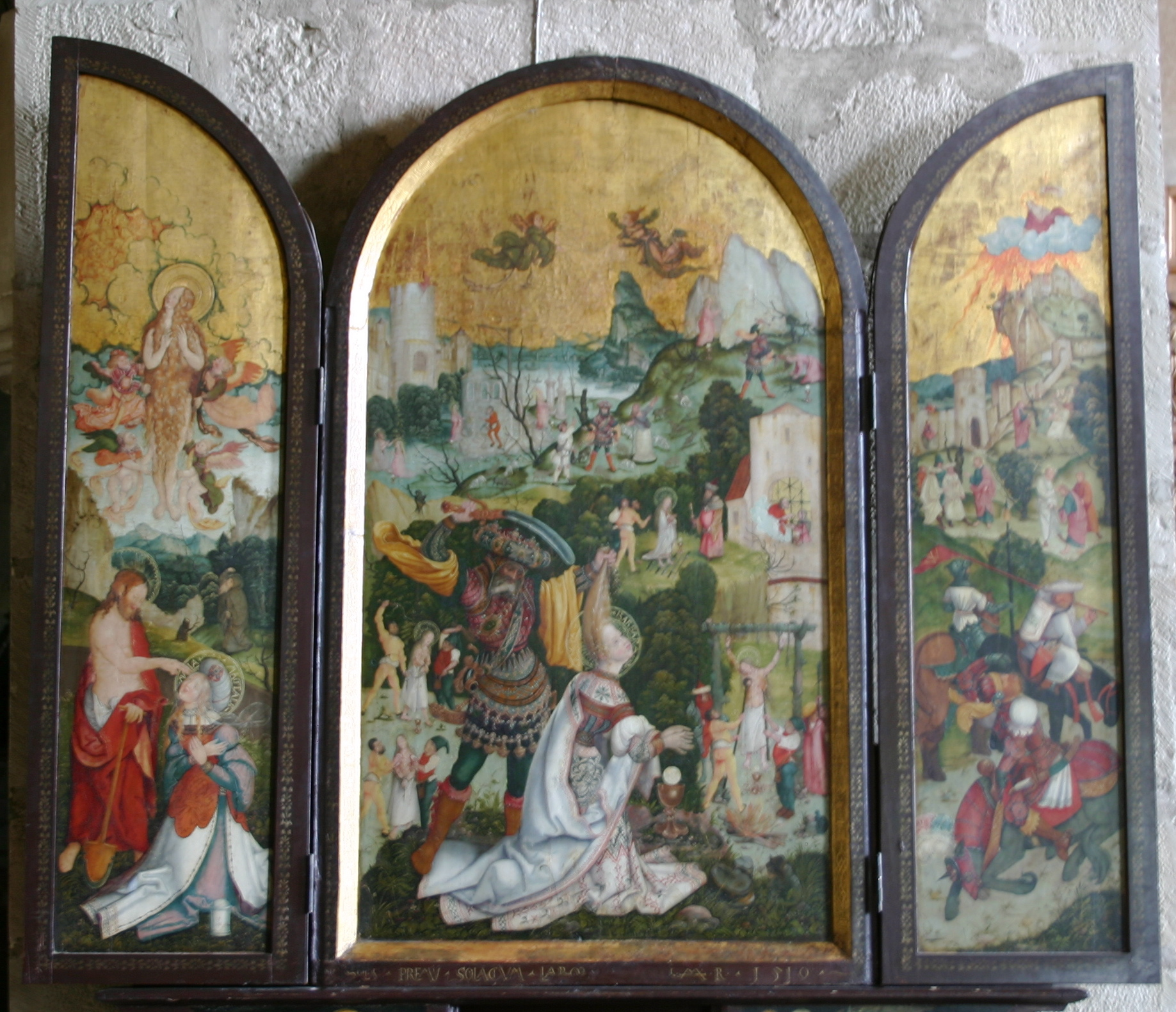 Altar Jerg Ratgeb Evangelische Stadtkirche Schwaigern